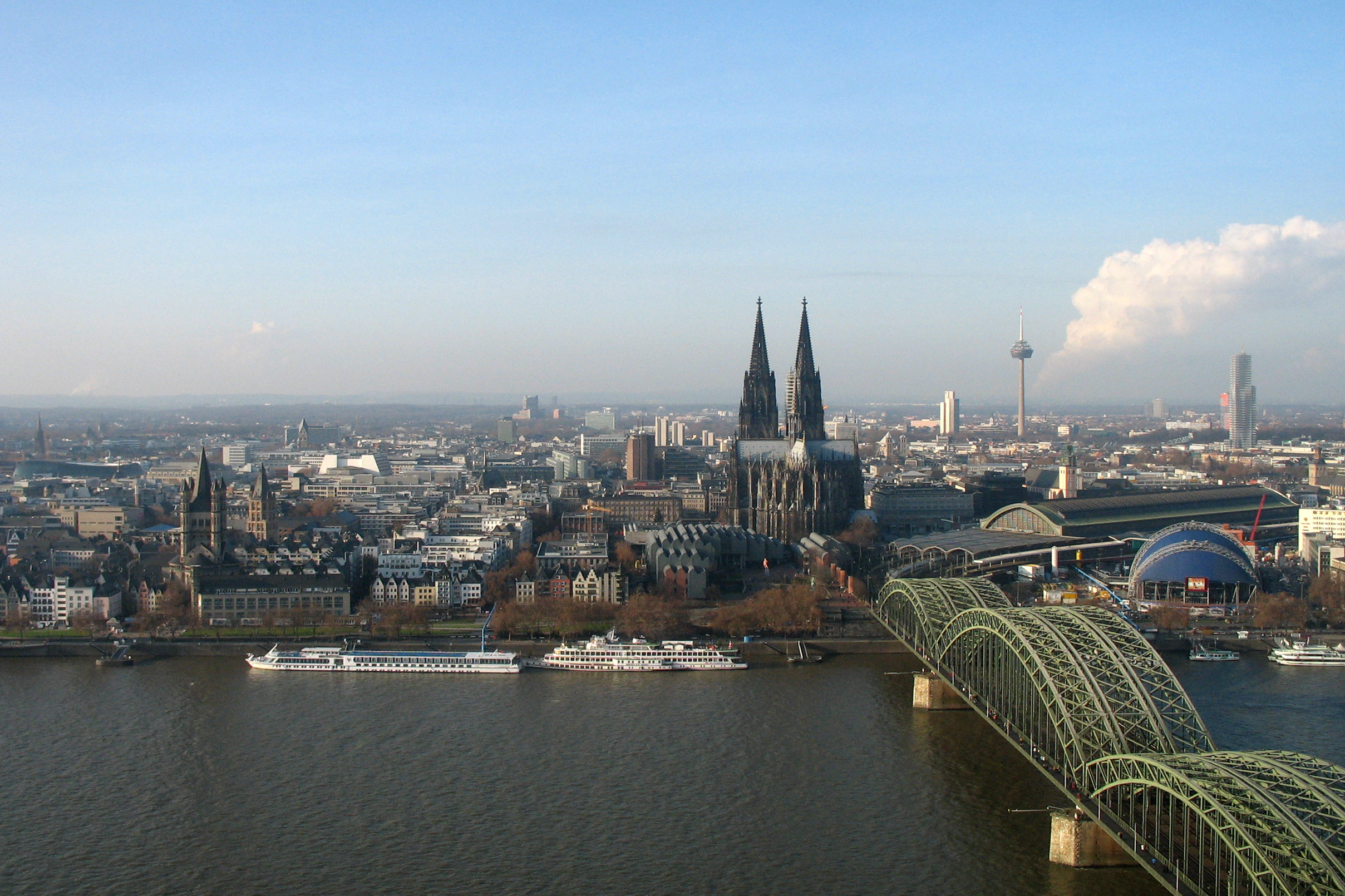 Panorama de la ville de Cologne: les bords du Rhin, la cathédrale, le pont Hohenzollern